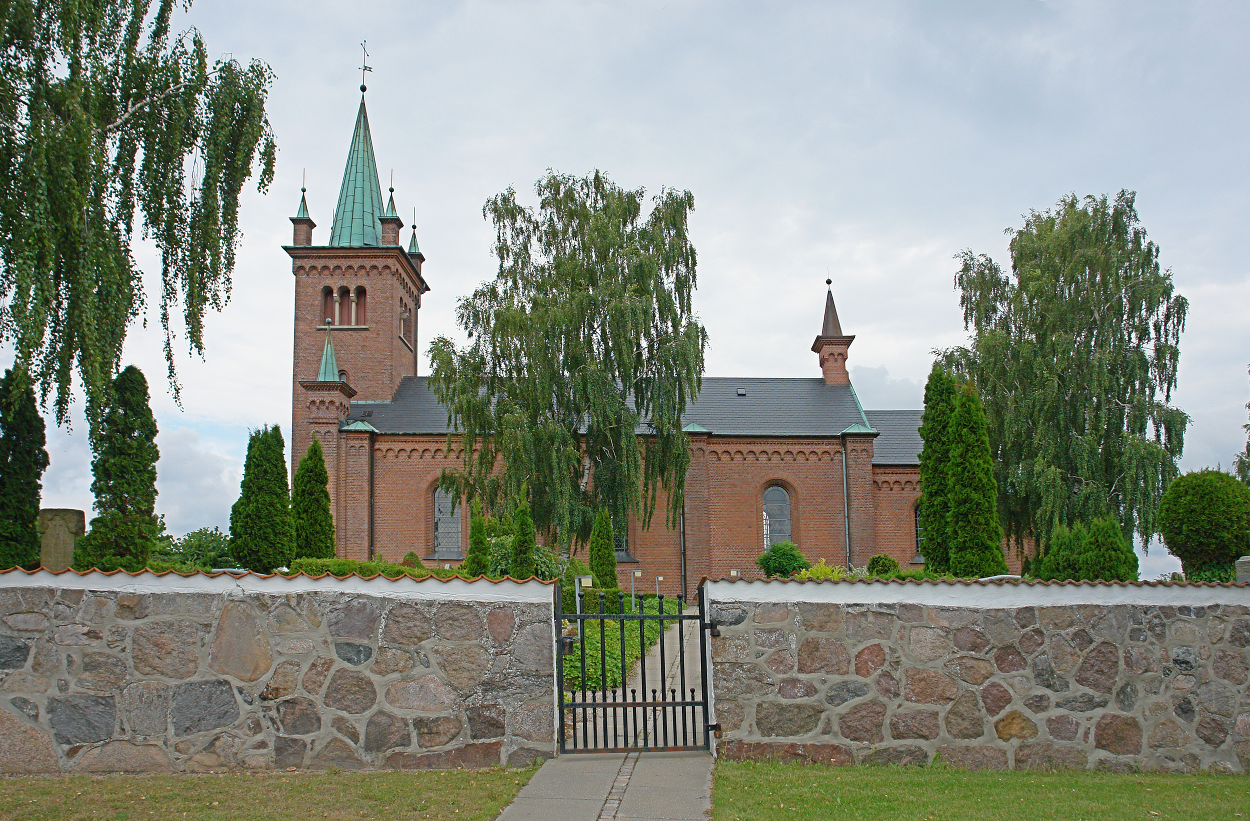 Kirche von Ugerløse, Dänemark (West-Seeland). Romanische Backsteinbau von 1876.